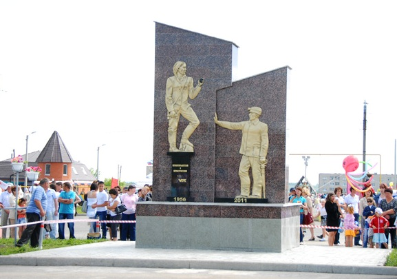 Межозёрный - Памятник первооткрывателям и первостроителям